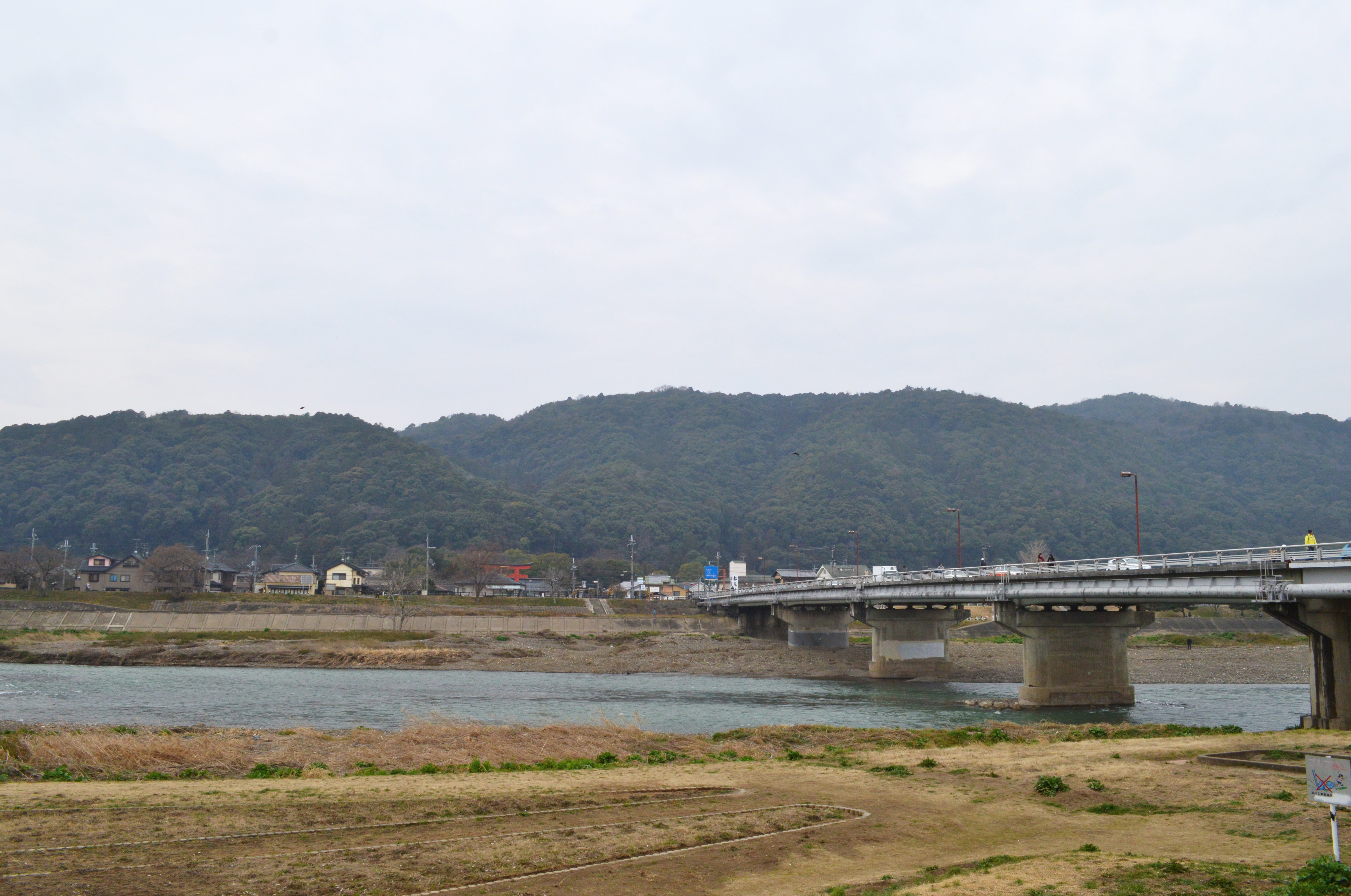 松尾大社 松尾山遠景